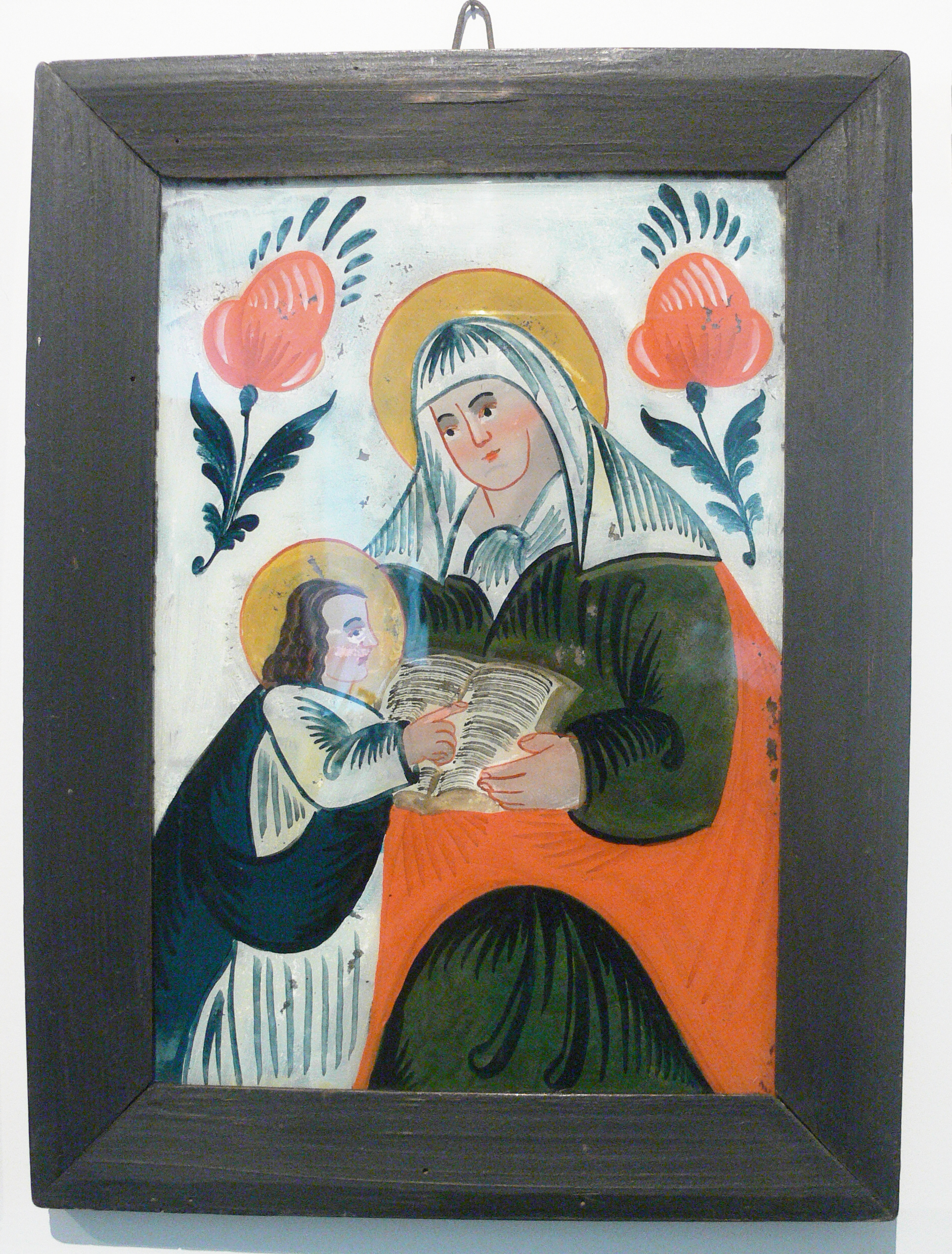 Hinterglasbild „Anna lehrt Maria“, in Fichtenholzrahmen, Sandl/Oberösterreich, 1. Hälfte 19. Jh. Landesmuseum Württemberg (Außenstelle Museum für Volkskultur in Württemberg, Waldenbuch) 1.1.1, Inv. Nr. LVK 1982/315